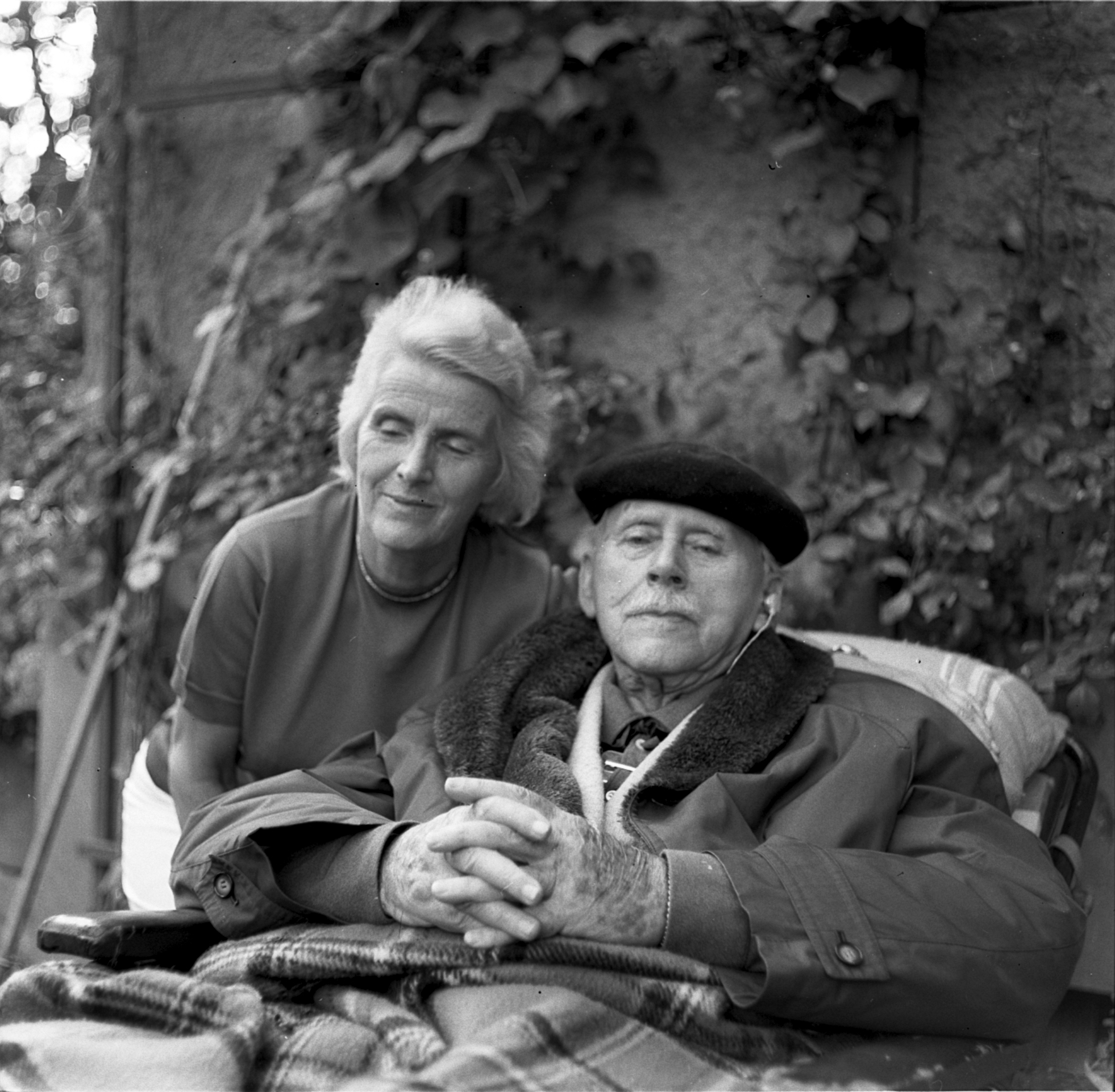 Karl Foerster mit seiner Frau Eva (geb. Hildebrandt) in seinem Garten am 28. September 1967